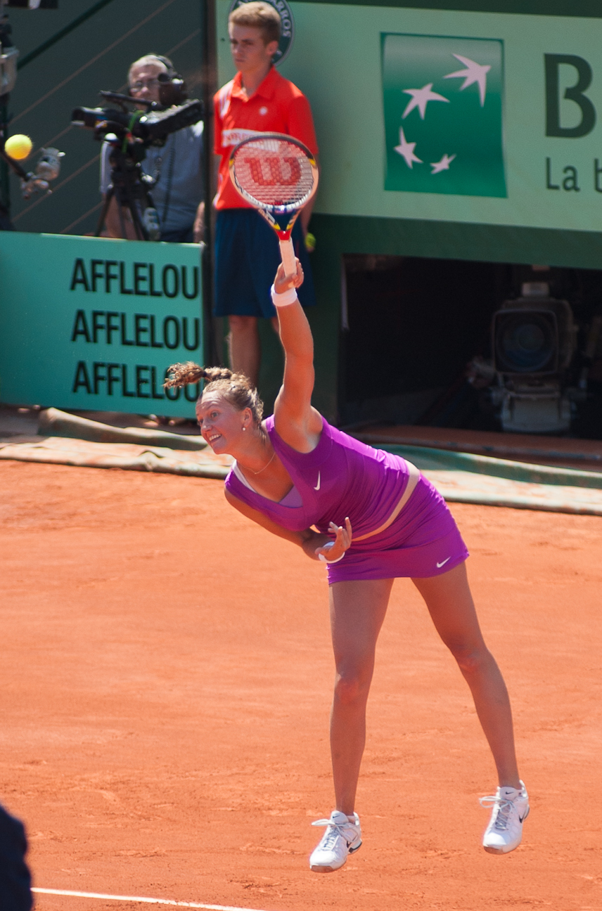 Petra Kvitová, Roland-Garros 2012.